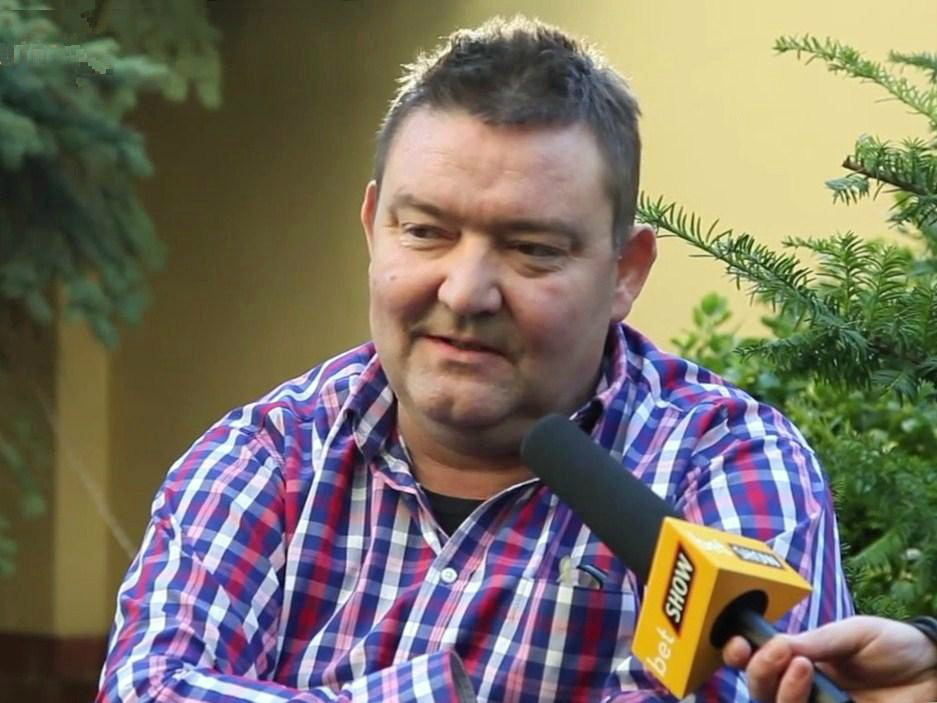 Paweł Zarzeczny (ur. 1961, zm. 2017), popularny dziennikarz sportowy specjalizujący się w tematyce piłki nożnej.